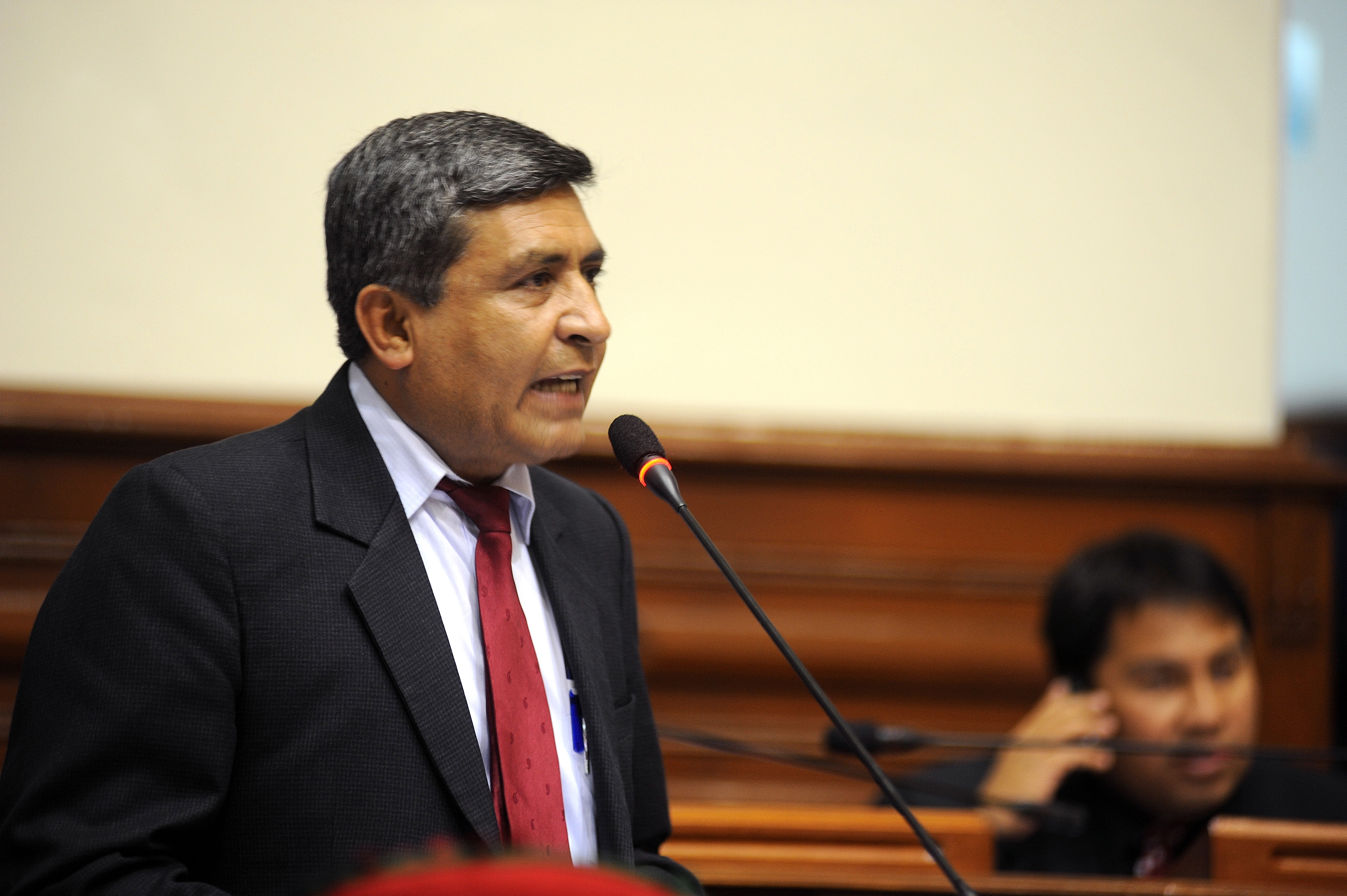 El congresista Rafael Vásquez Rodríguez fija su posición en el debate parlamentario realizado esta tarde por el Pleno.